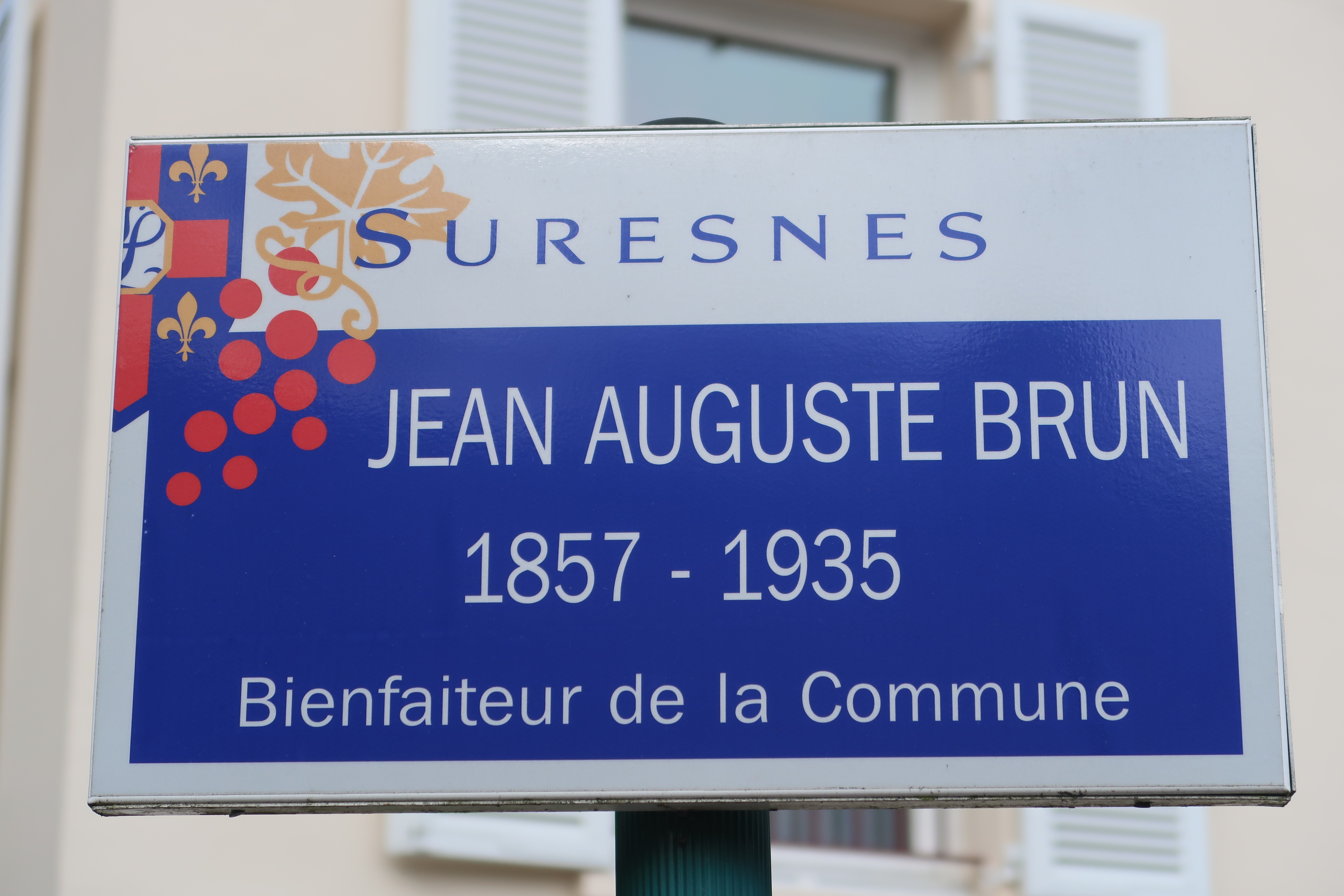 Plaque de la rue Jean-Auguste-Brun à Suresnes (Hauts-de-Seine).